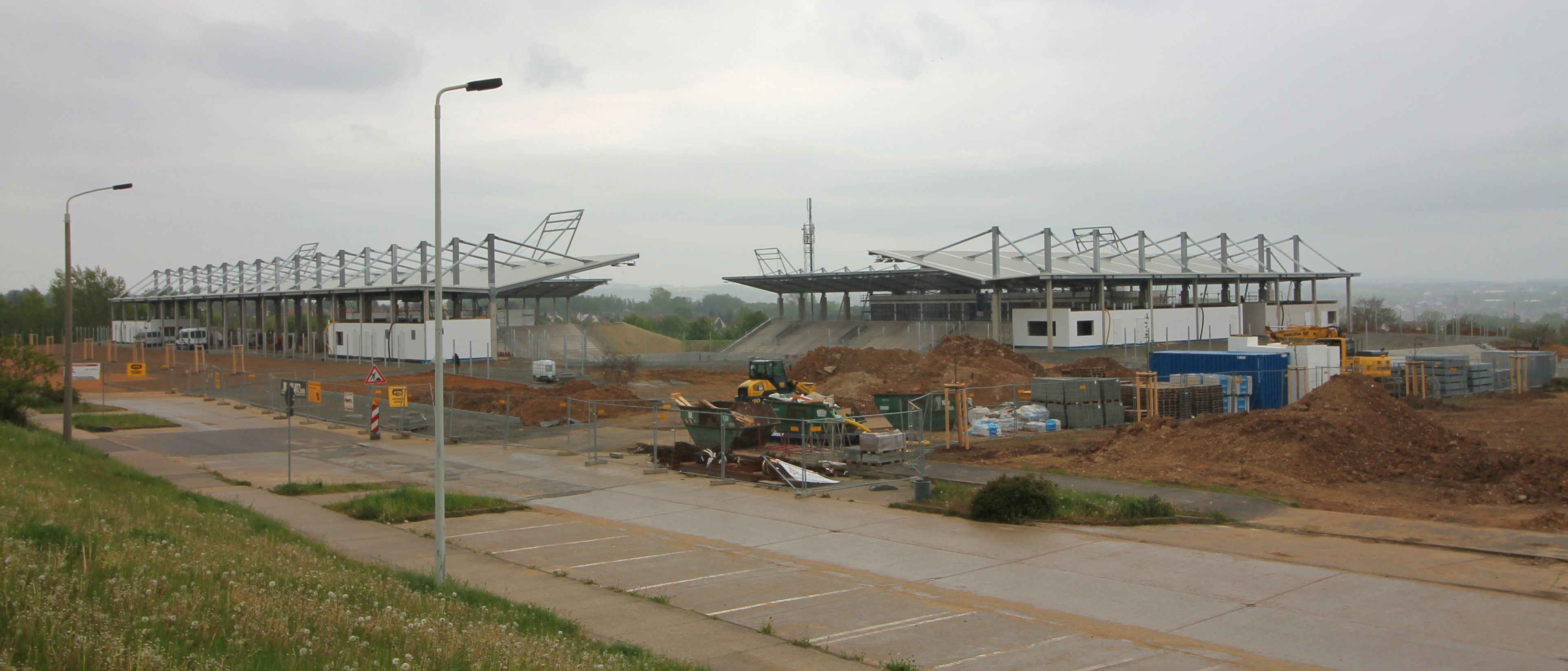 Baustelle des neuen FSV-Stadions in Zwickau-Eckersbach (E5). Zwickau, Sachsen, Deutschland.